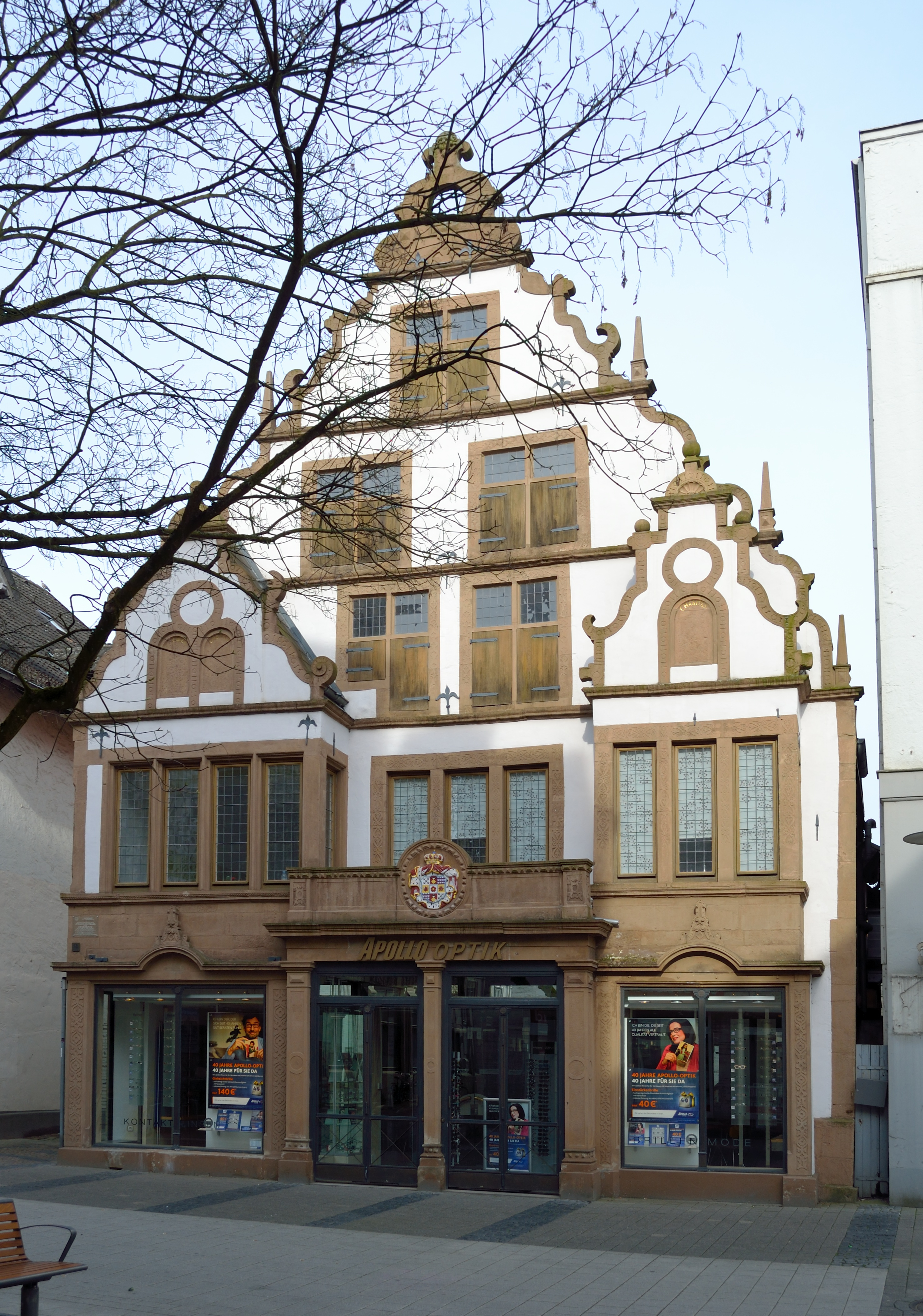 This is a photograph of an architectural monument. Steinernes Giebelhaus mit Renaissance-Fassade